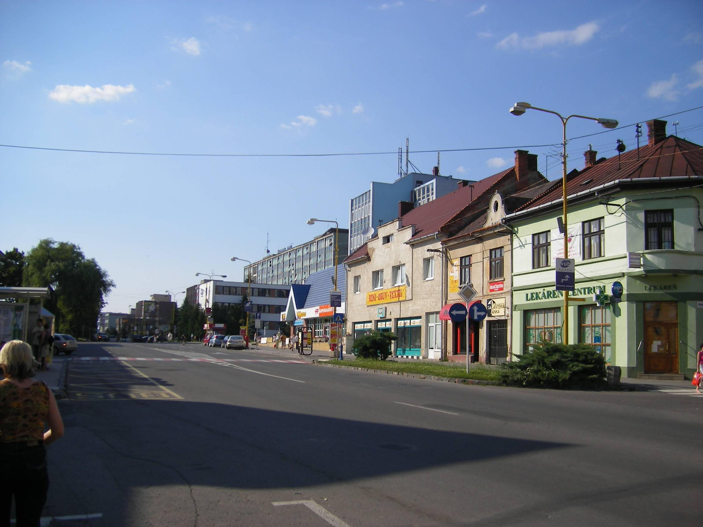 Vranov nad Topľou, námestie Slobody